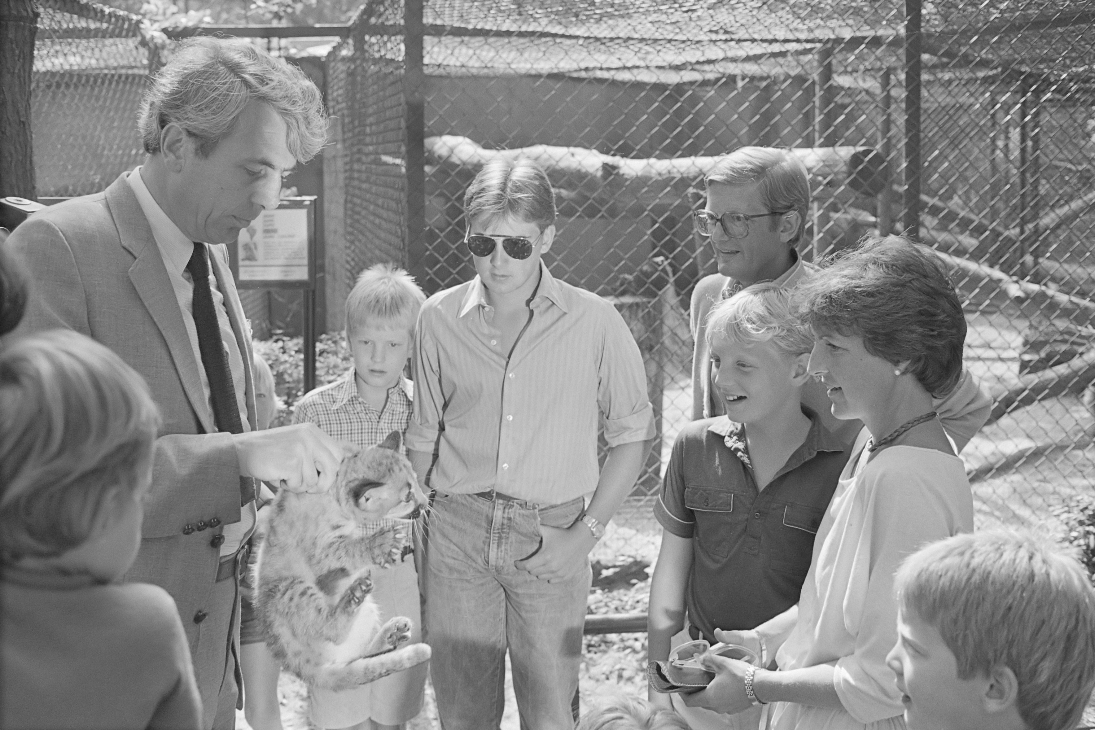 Prinses Margriet met haar gezin in Burgers Dierenpark te Arnhem. Directeur Antoon van Hooff geeft een toelichting 18 juli 1983